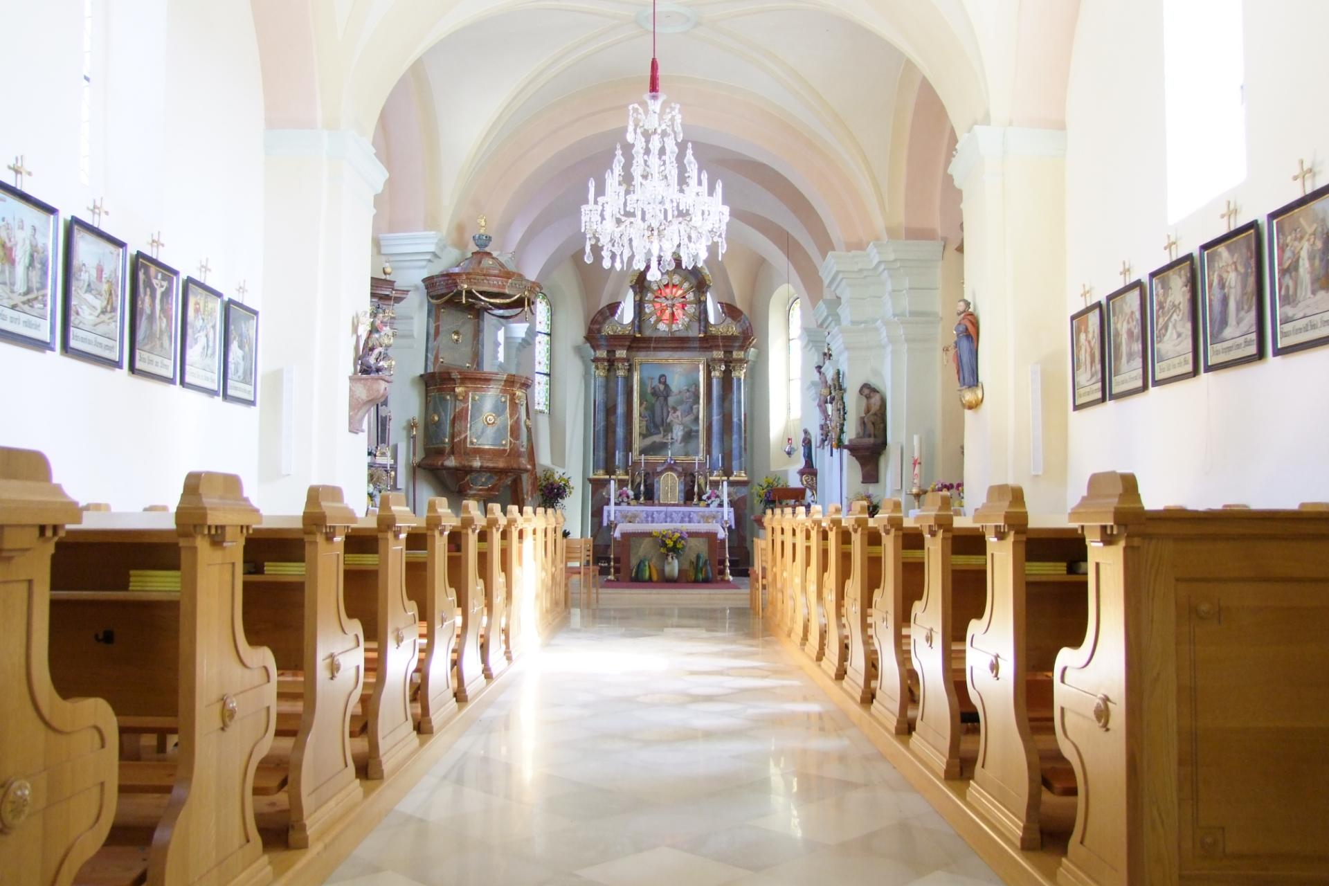 Kath. Pfarrkirche hl. Johannes der Täufer